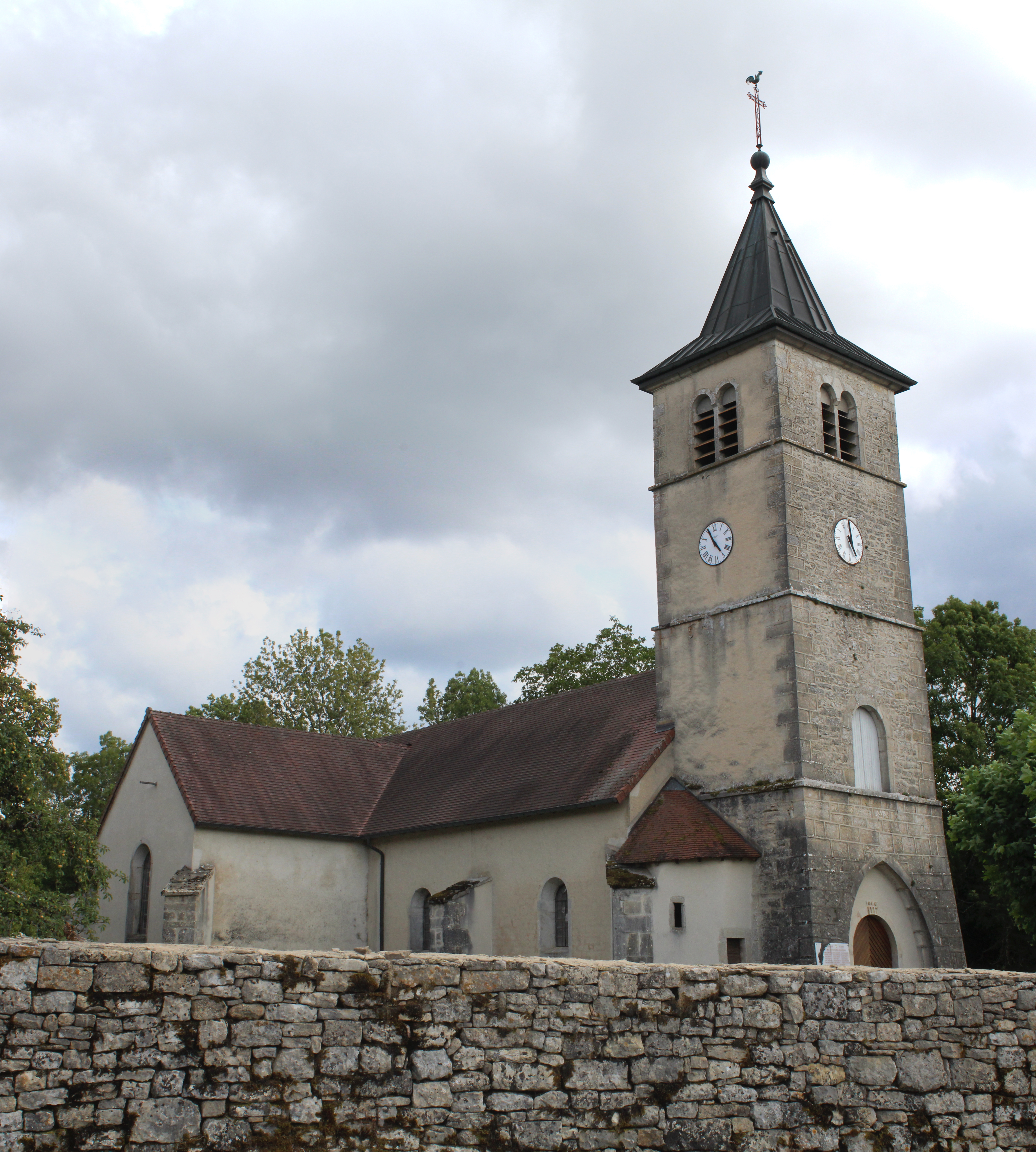 Église Saint-Pancrace de Sarrogna.